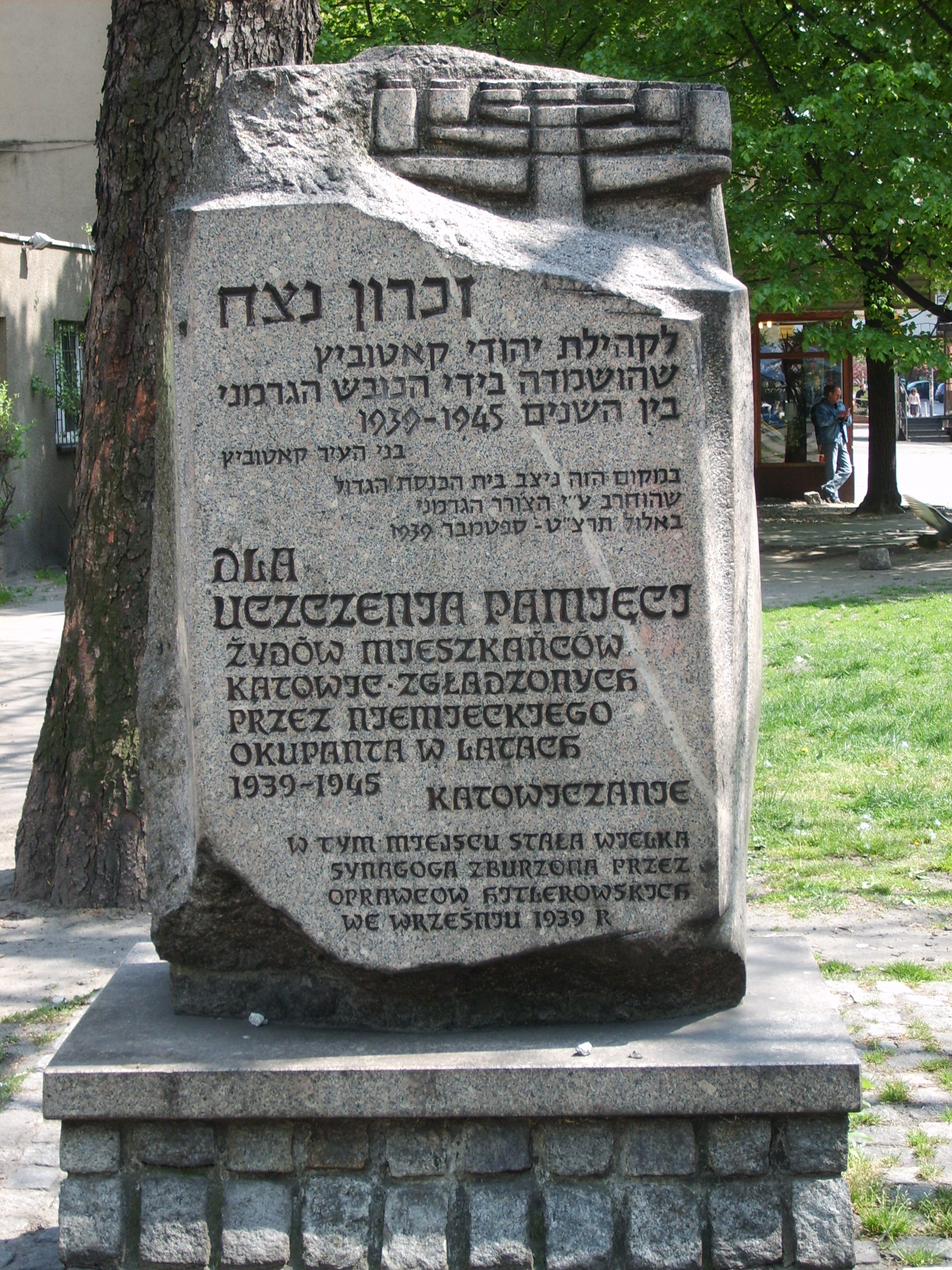 Pomnik dla uczczenia pamięci Żydów, mieszkańców Katowic - zgładzonych przez niemieckiego okupanta w latach 1939-1945